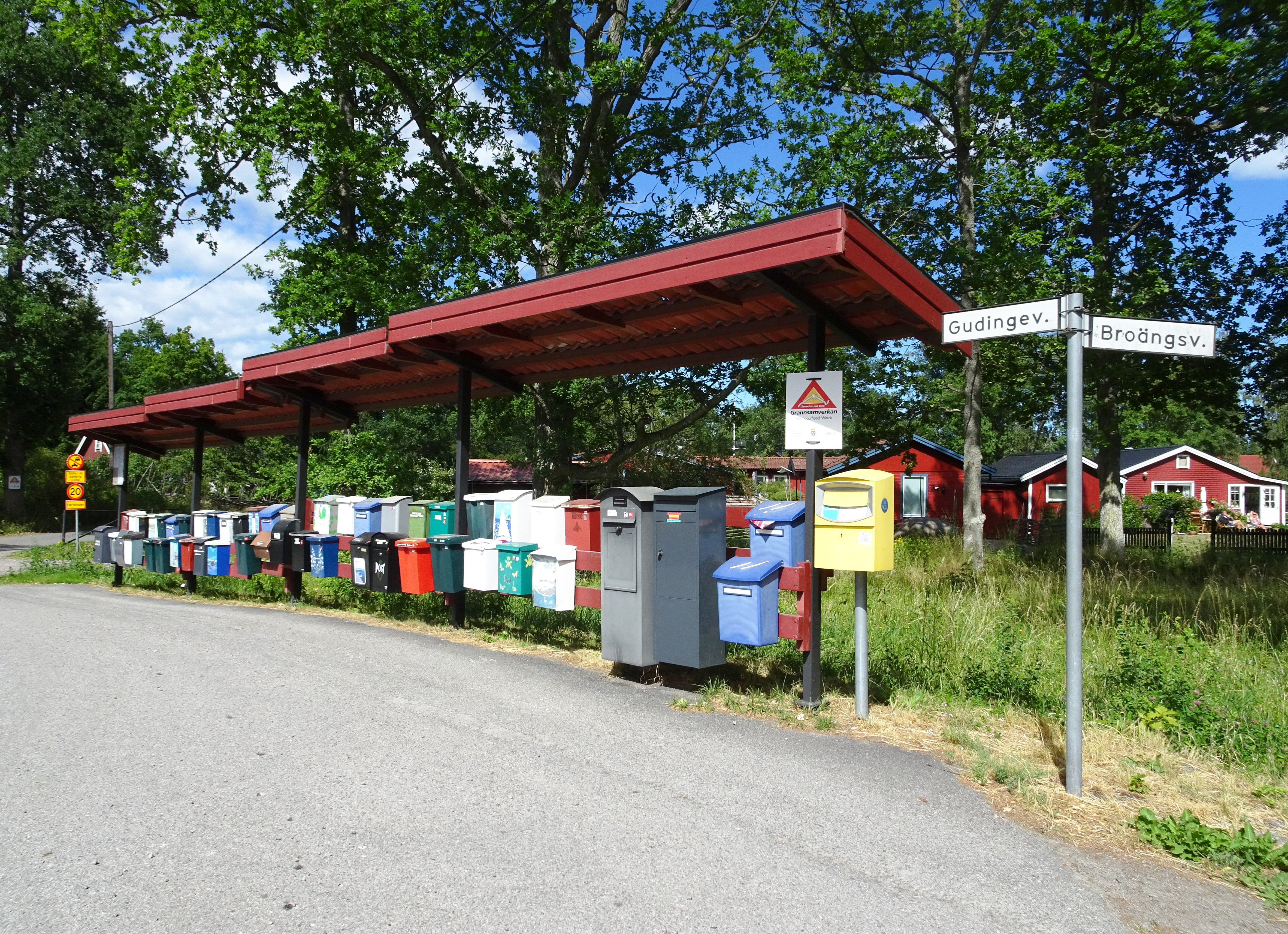 Brevlådor på Gränsö